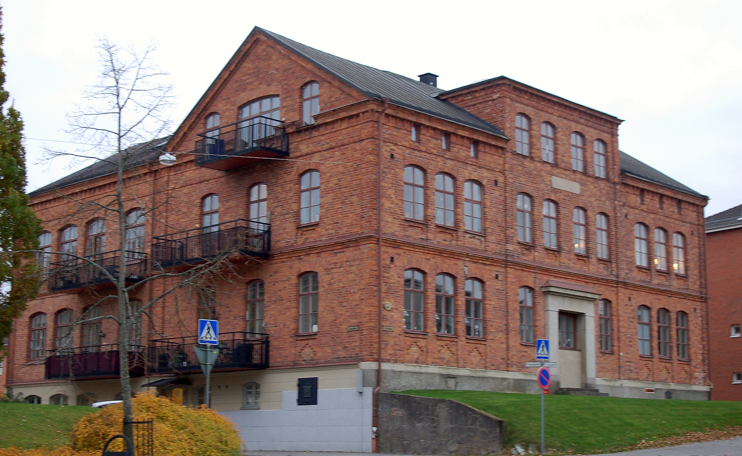 Gamla gymnasiet, Hallsberg.